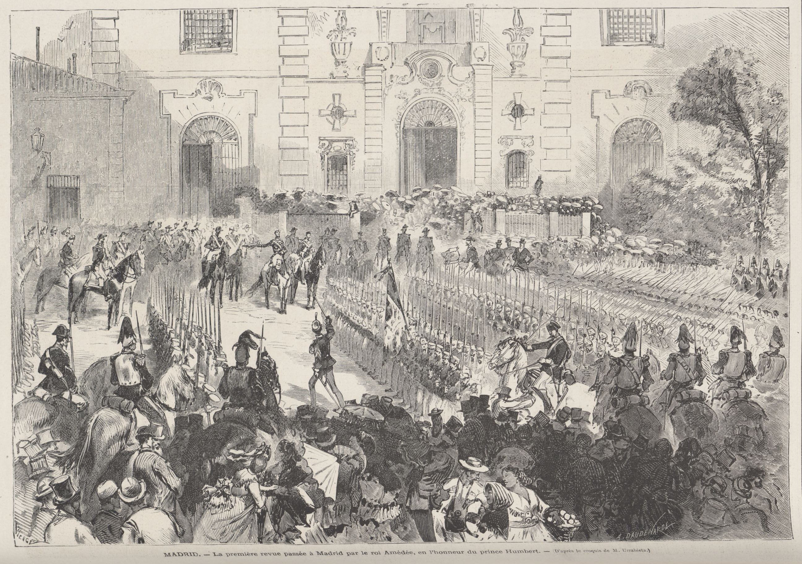 Madrid - La première revue passée à Madrid par le roi Amédée, en l'honneur du prince Humbert, en la revista Le Monde Illustré.